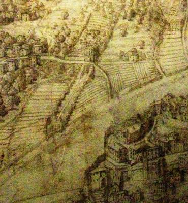 stralcio da una veduta di Massa del XVII secolo, conservata all'Archivio di Stato di Modena